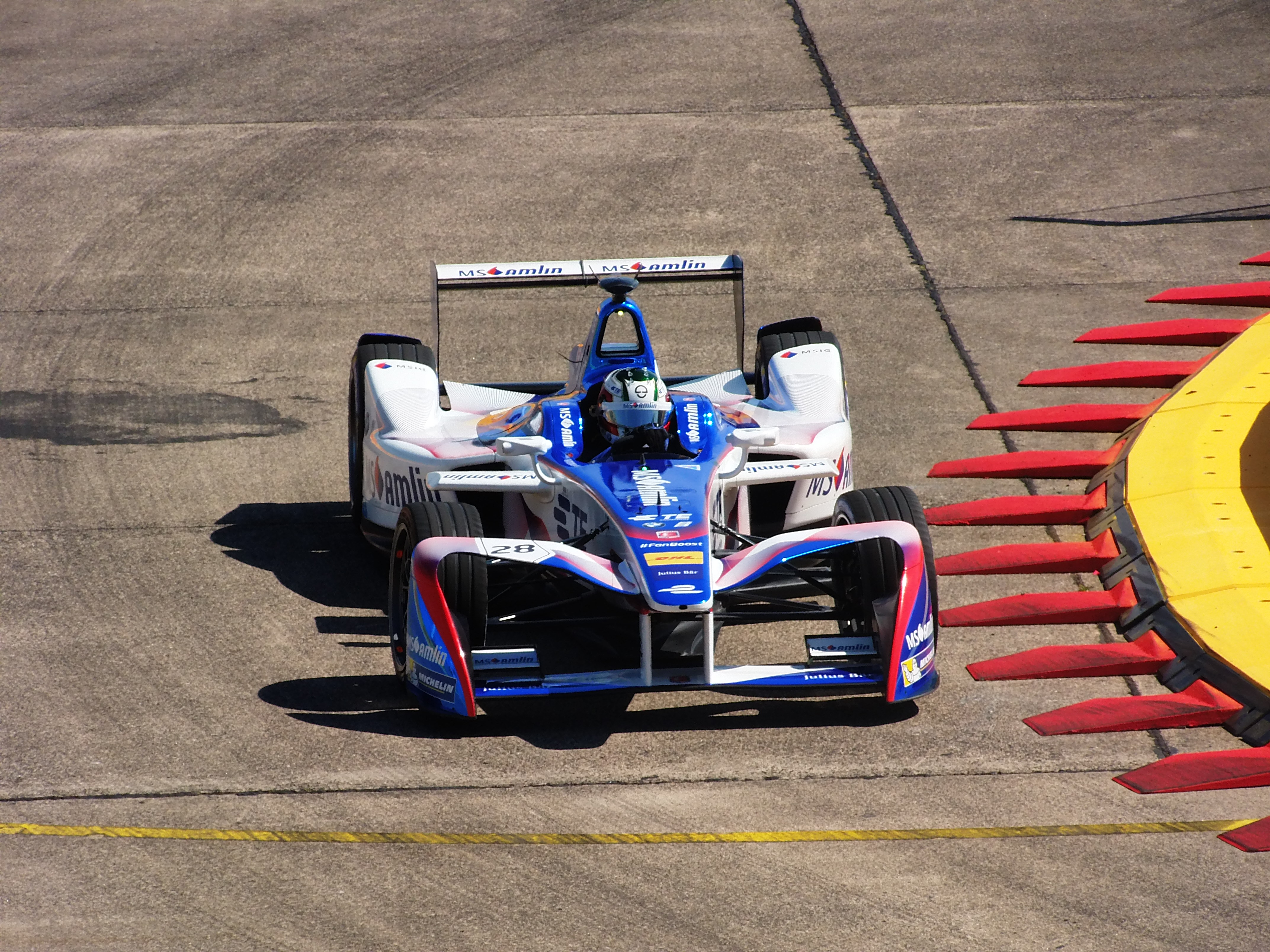 António Félix da Costa (Andretti Formula E) beim Berlin ePrix 2017